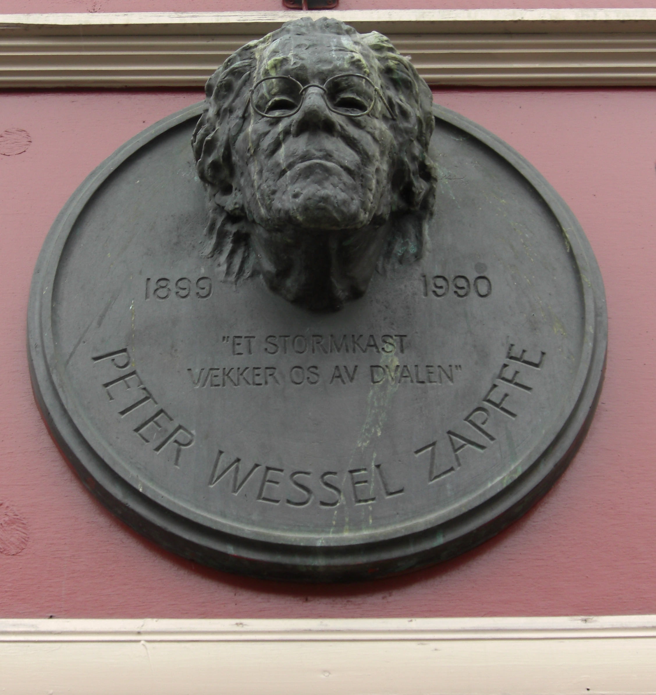 Gedenktafel für Peter Wessel Zapffe (1899-1990), norwegischer Schriftsteller, Philosoph und Bergbesteiger; Tromsö, Norwegen